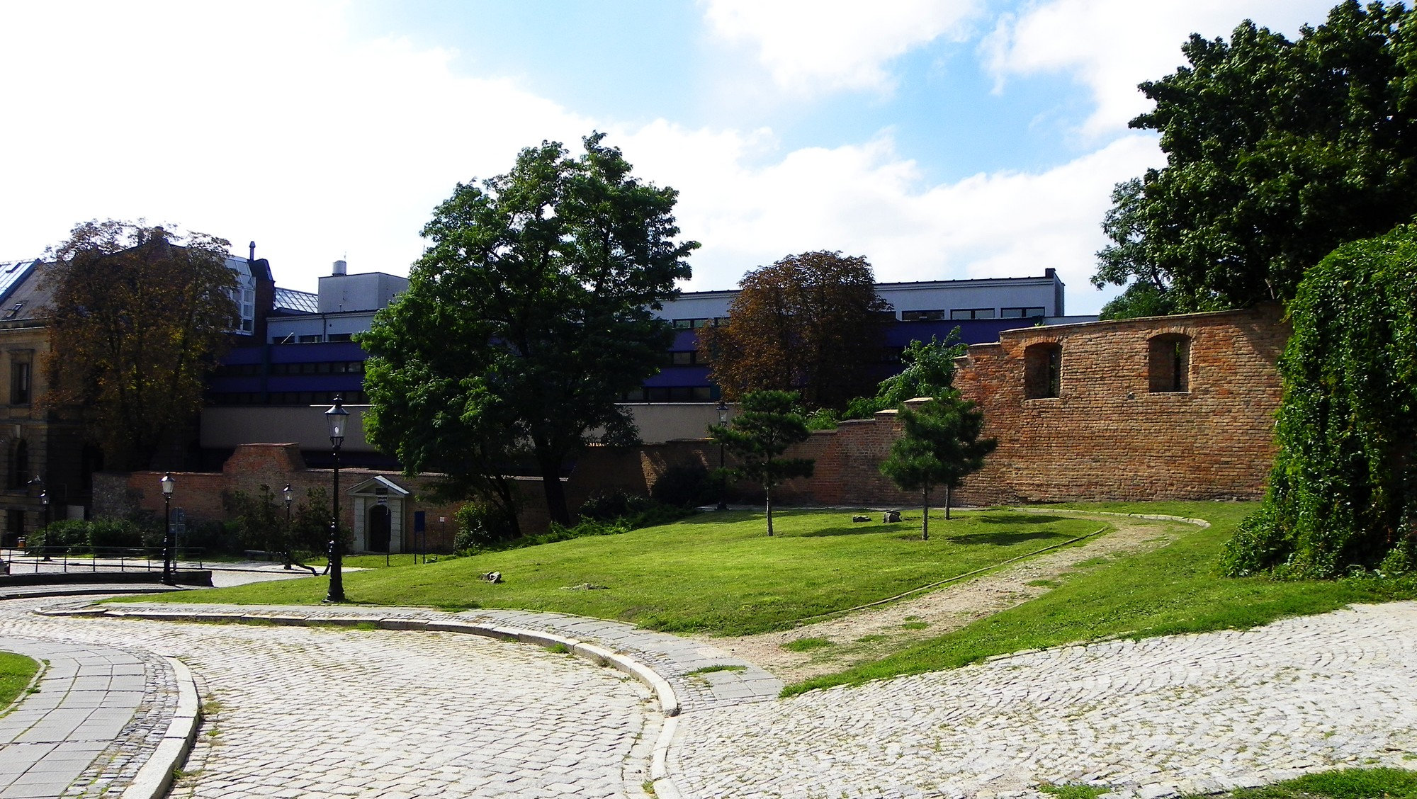 Mury miejskie na Górze Przemysła